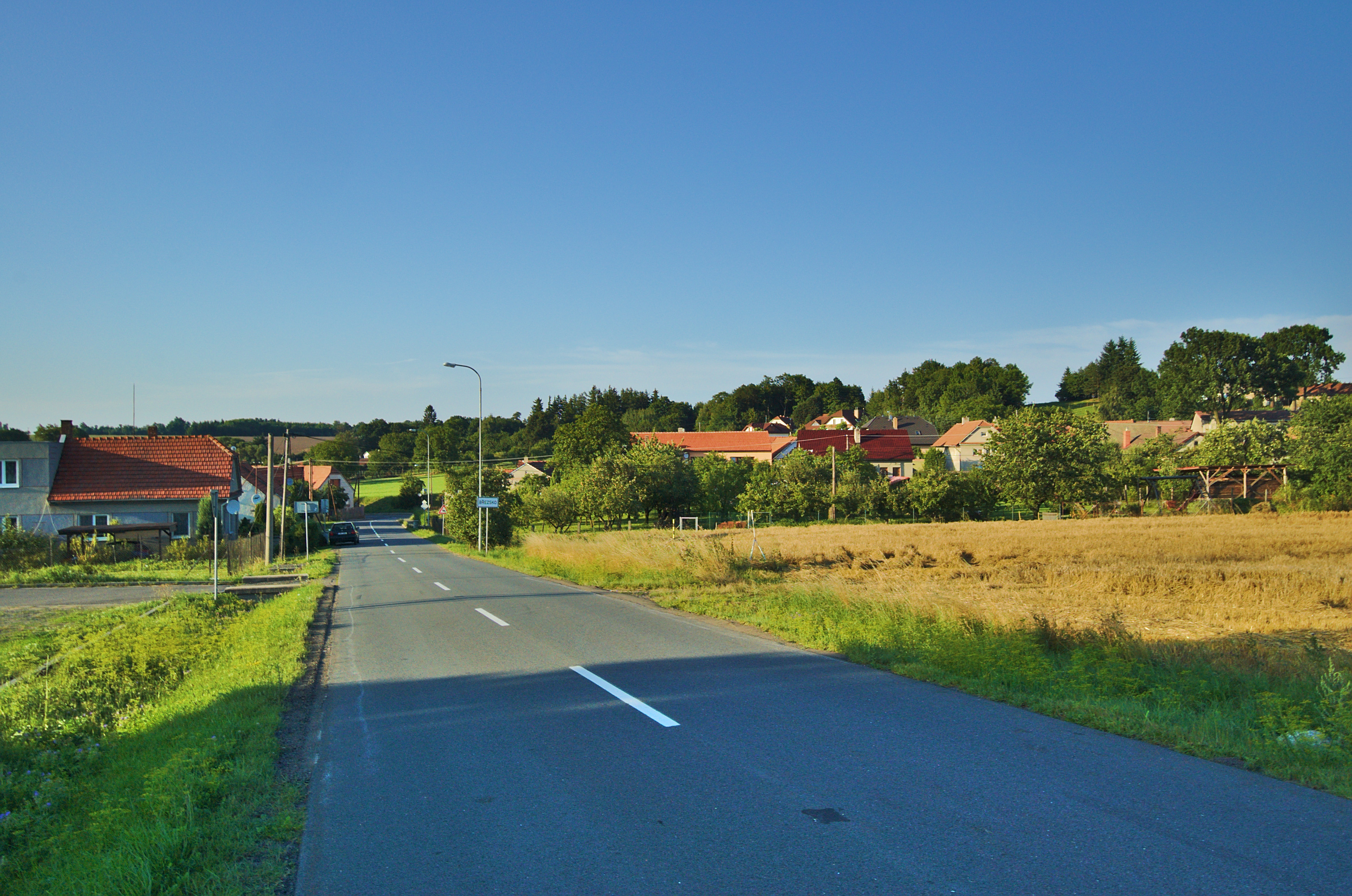 Pohled na obec od jihu z hlavní silnice na Konici, Březsko, okres Prostějov